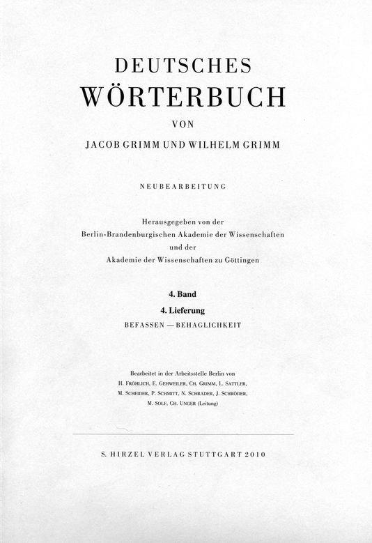 Titelseite der Lieferung 4 zu Band 4 der Neubearbeutung von Grimms Deutschem Wörterbuch